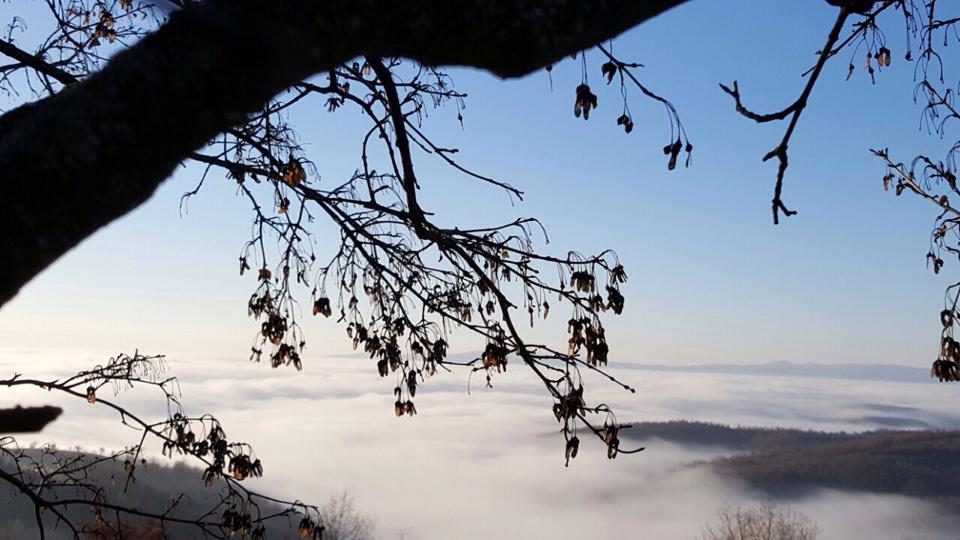 Një ditë me mjegull , në fshatin Burincë